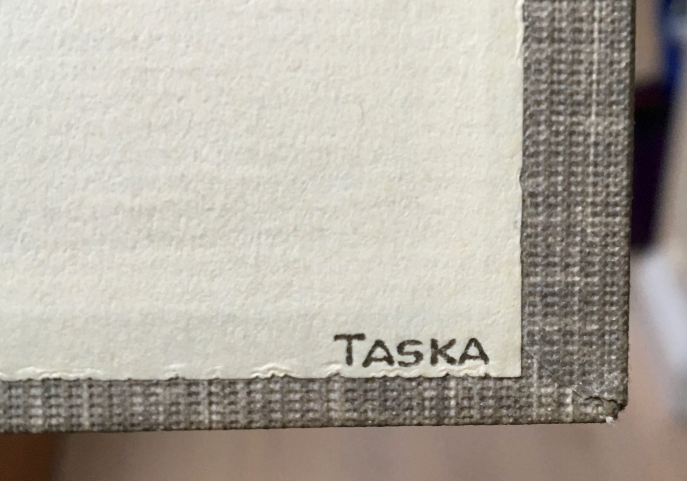 Taska köitemärgis